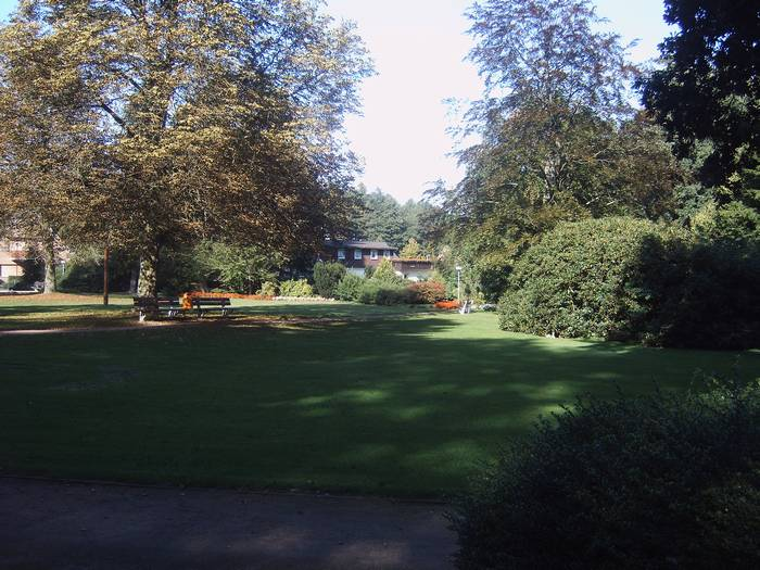 Park Bruchhausen-Vilsen Ansicht 1